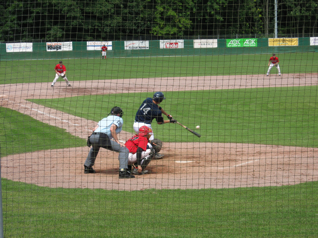 Viertelfinale Deutsche Meisterschaft 2008, Spiel 3 zwischen Heidenheim Heideköpfe und Dortmund Wanderers. Simon Guehring am Schlag und gerade dabei, einen Basehit zu landen. Heidenheim gewinnt das Spiel mit 10:1.